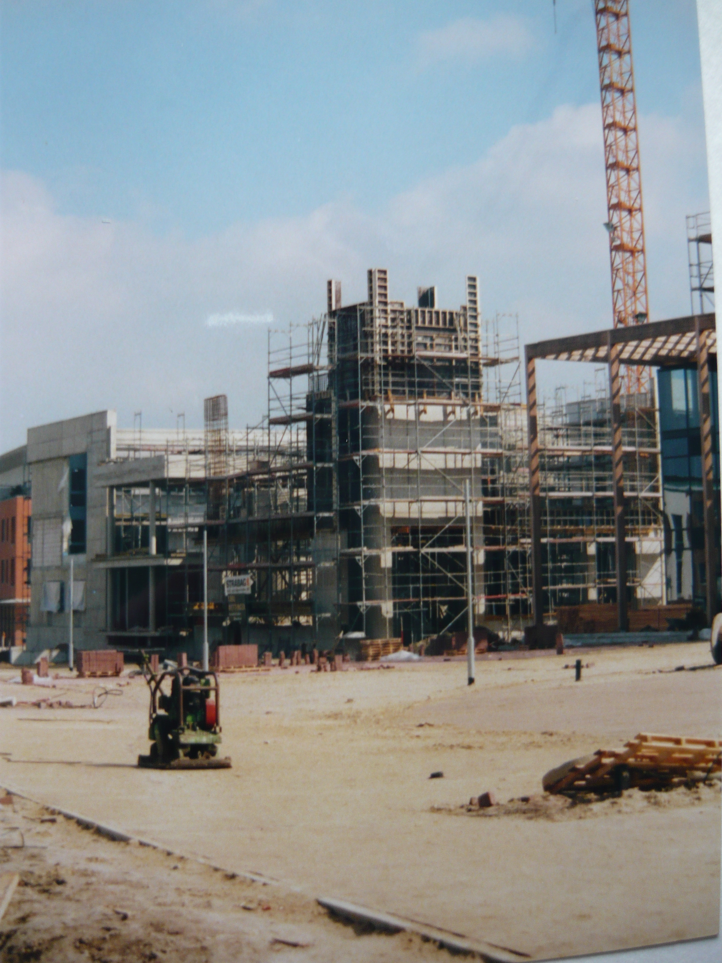 Der Glockenturm entsteht